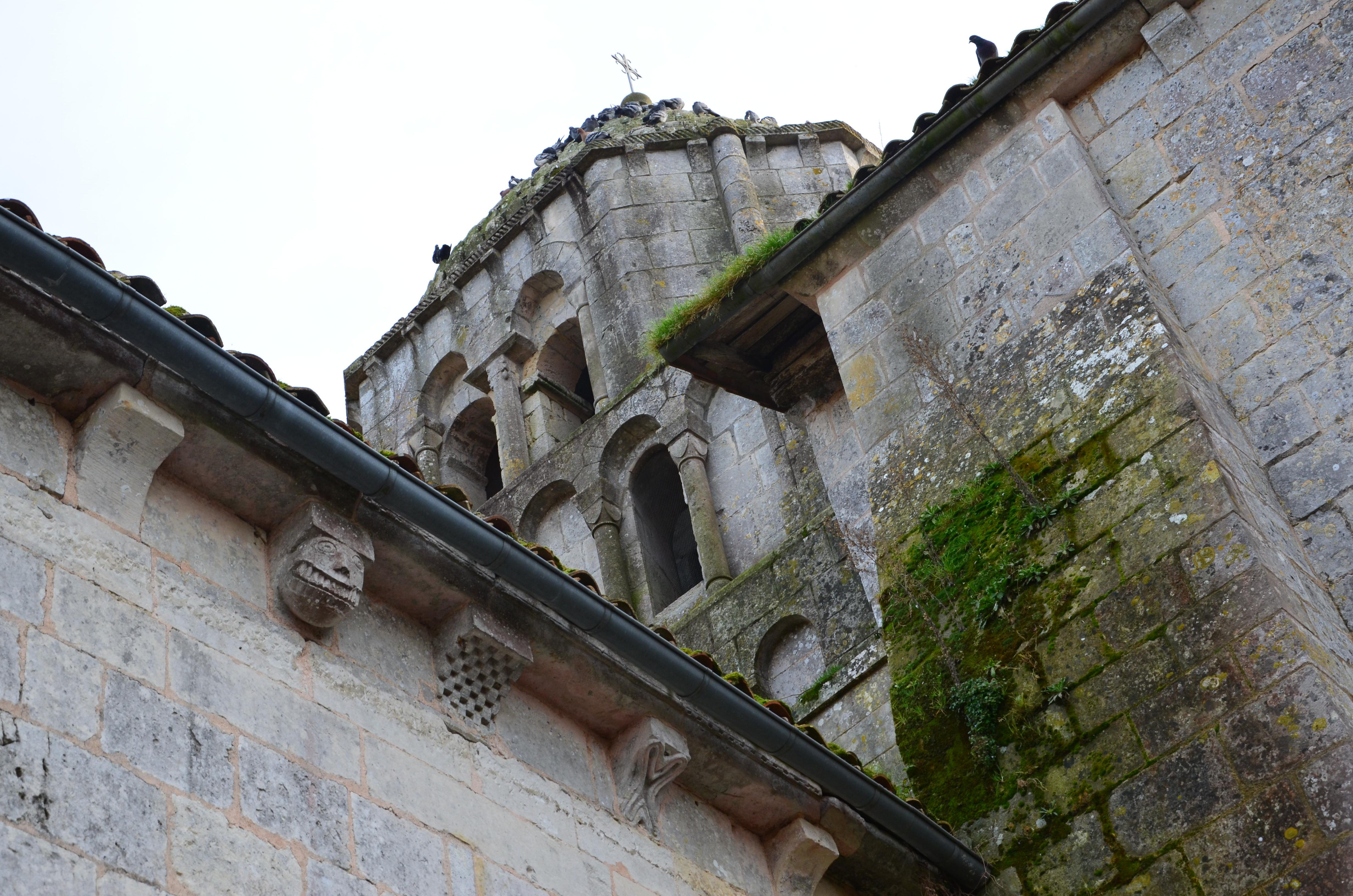 Modillons